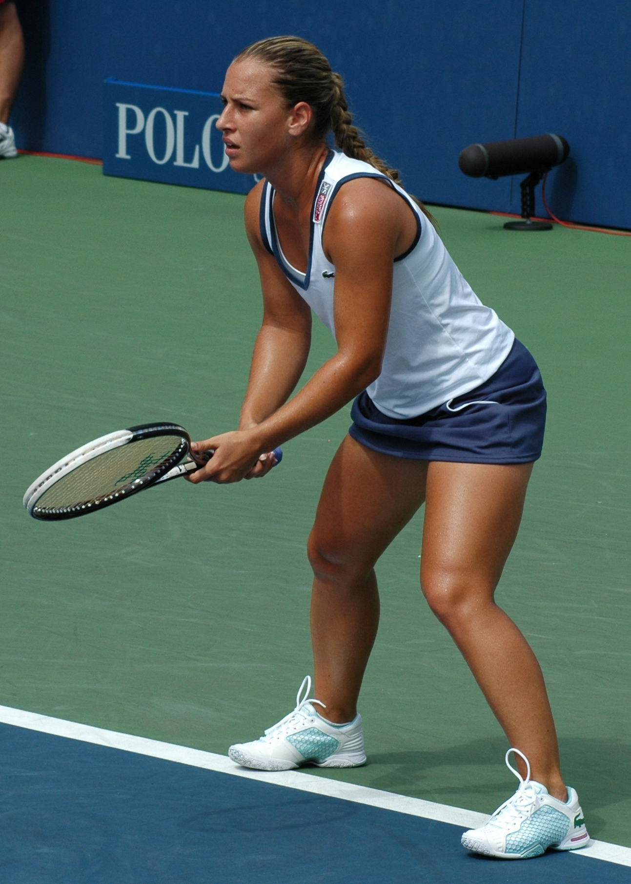 Dominika Cibulkova at the 2008 US Open